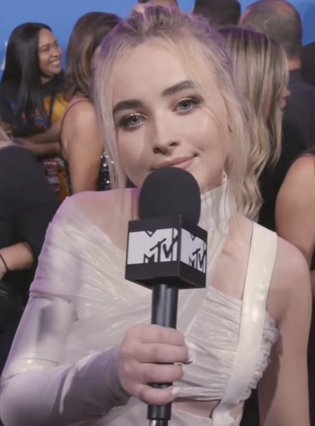 Jennifer Lopez has inspired millions of people around the world. We ask Amber Rose, Jessie Reyez, Sofia Carson, Tyga and more how JLO has inspired their careers.